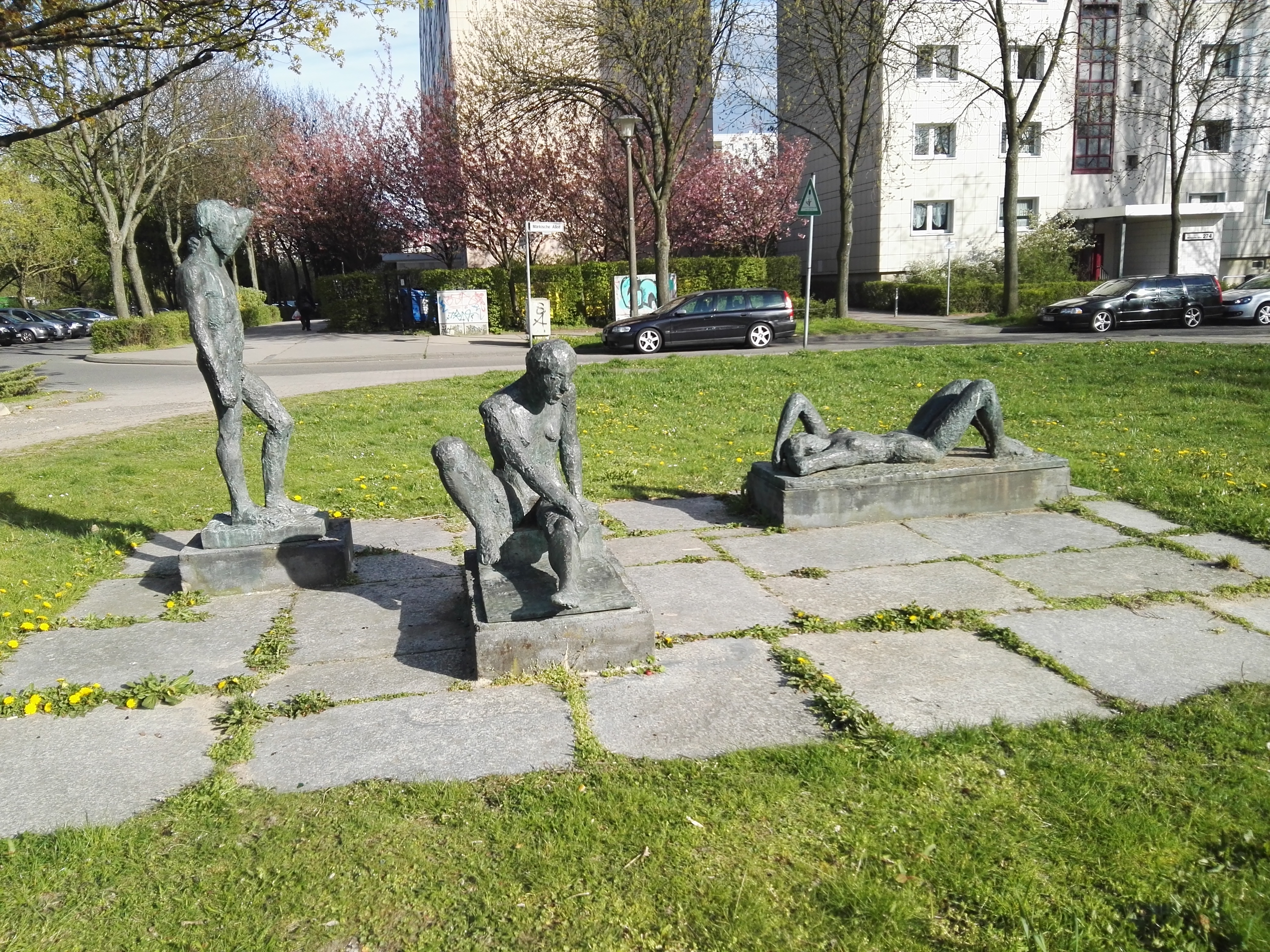 Plastiken “Stehender, Sitzende, Liegende“ von Sylvia Hagen am S-Bahnhof Mehrower Allee